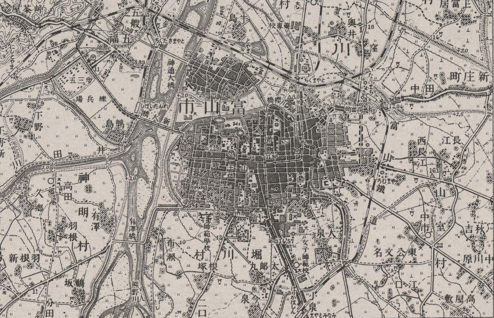 1930年（昭和5年）当時の富山市周辺地図。